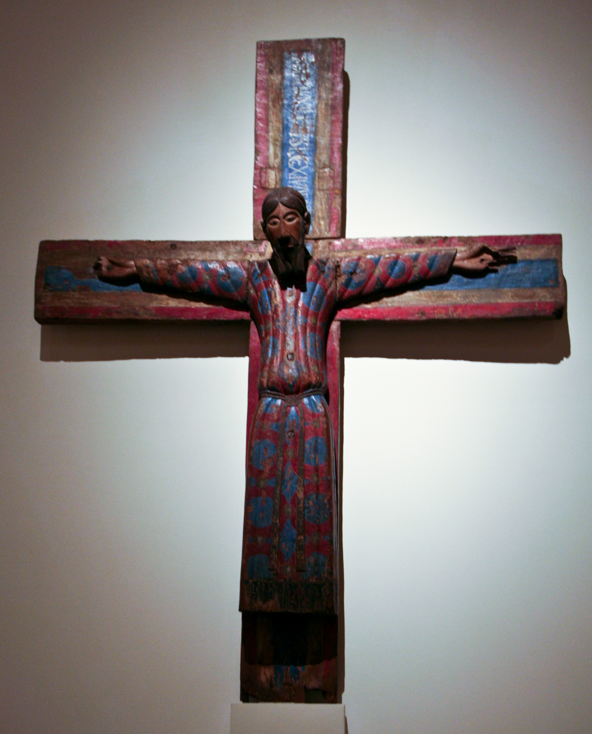 Quaerere Deum